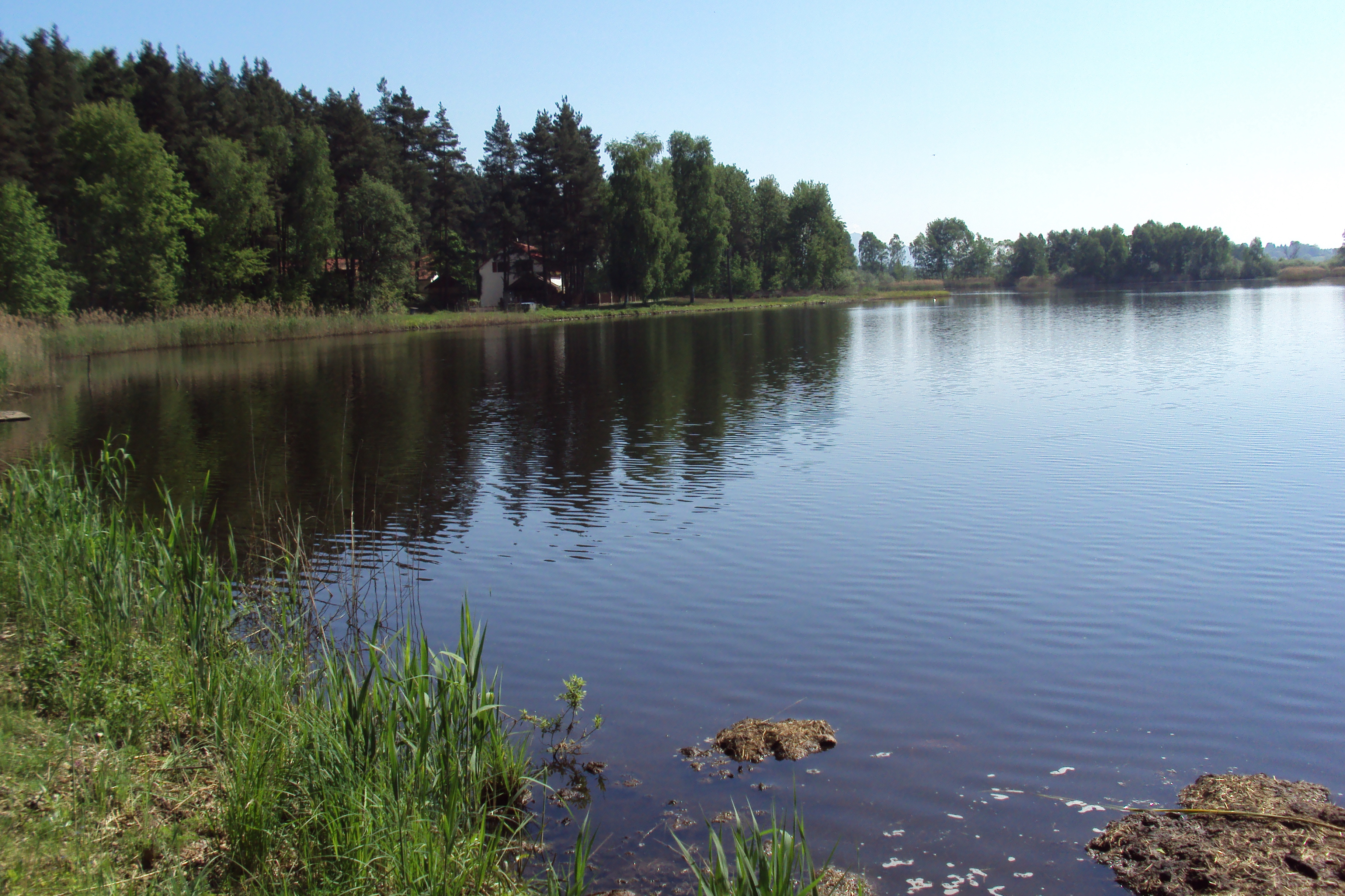 Velký Heřmanický rybník je 6 km JV od České Lípy